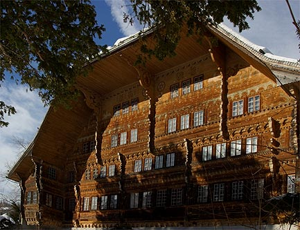 Switzerland, Rossinière, Le grand chalet avec 113 fenêtres de